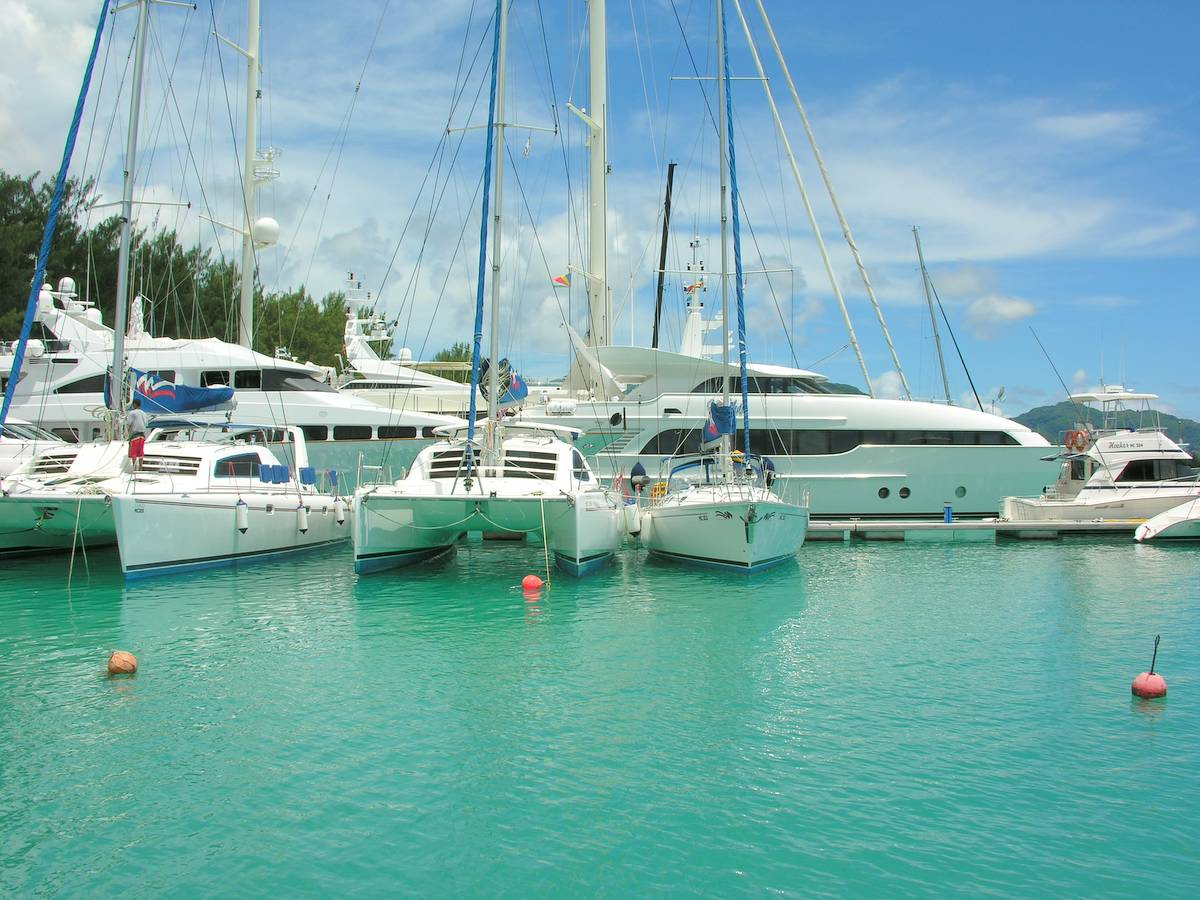 Seychelles, Mahé Island